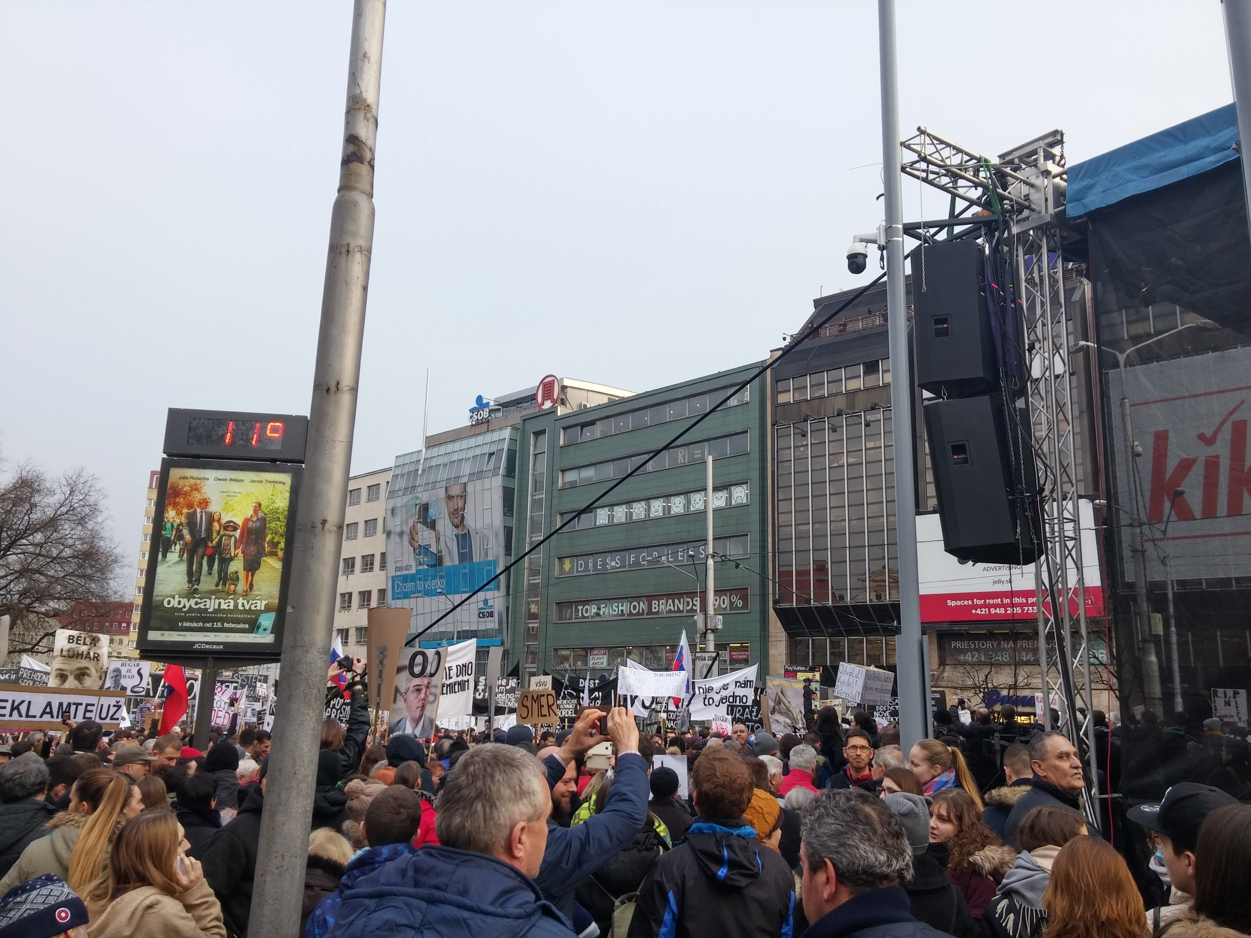 Anti government protests in Bratislava, Slovakia on March 16, 2018 at SNP Square